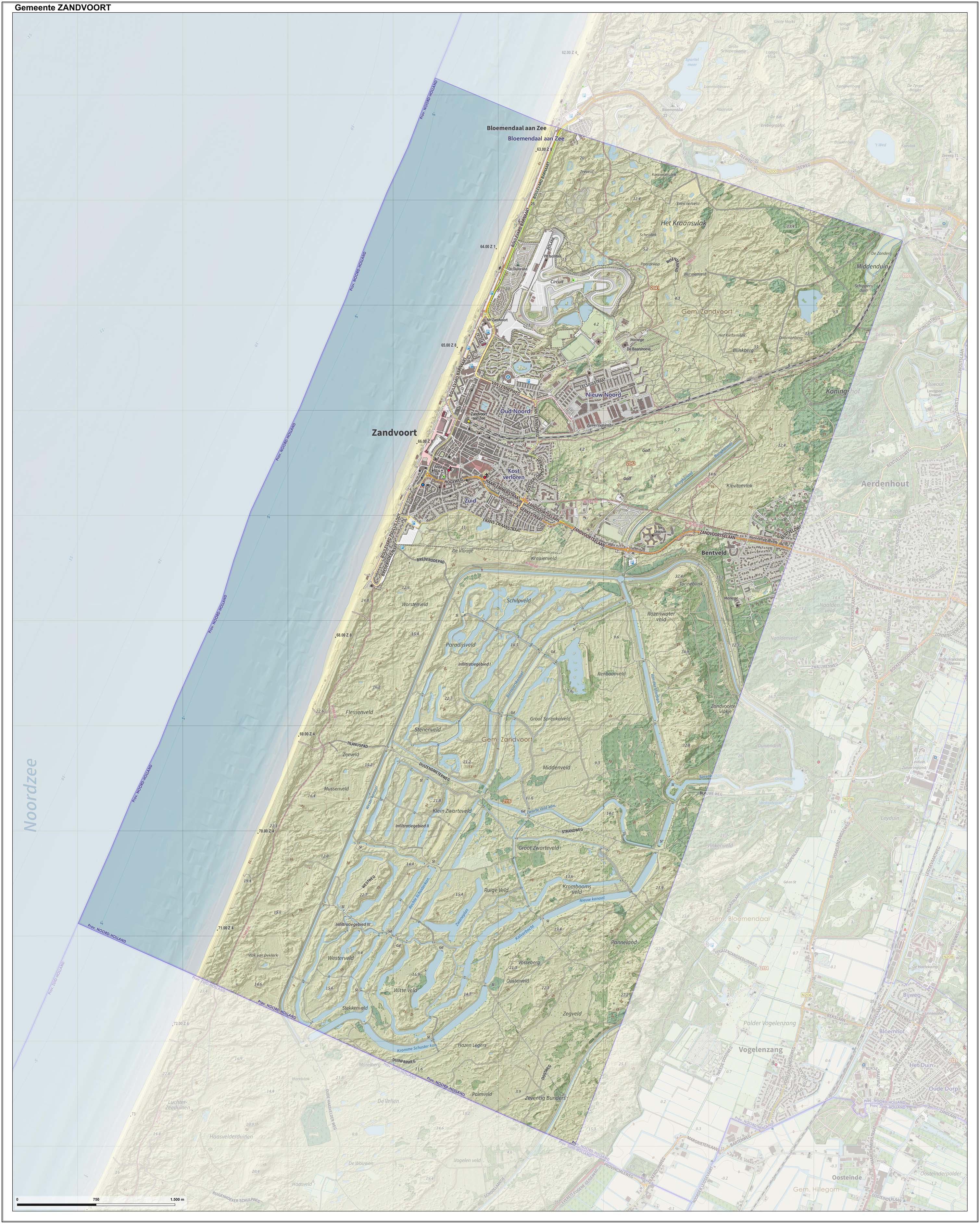 Topografische gemeentekaart. Resolutie: 400 pixels/km. Kaartbeeld samengesteld uit de open geodata van de Top10NL en Top25namen (Kadaster), Creative Commons-BY licentie. Gebouwvlakken uit open geodata BAG extract. Wegen uit de OpenStreetMap, OpenStreetMap community. Reliëfschaduw uit de Actuele Hoogtekaart AHN2. Samenstelling en kleurenschema: Jan-Willem van Aalst, met QGIS. Zie ook de Legenda.